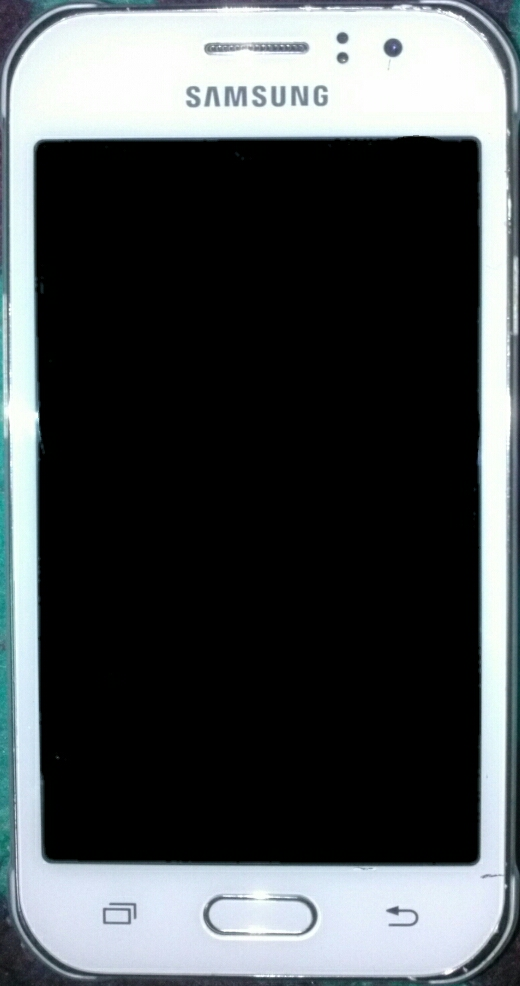 هاتف من إنتاج شركة سامسونغ للإلكتونيات